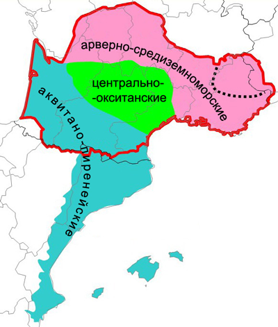 Классификация диалектов окситанского языка (Pierre Bec)